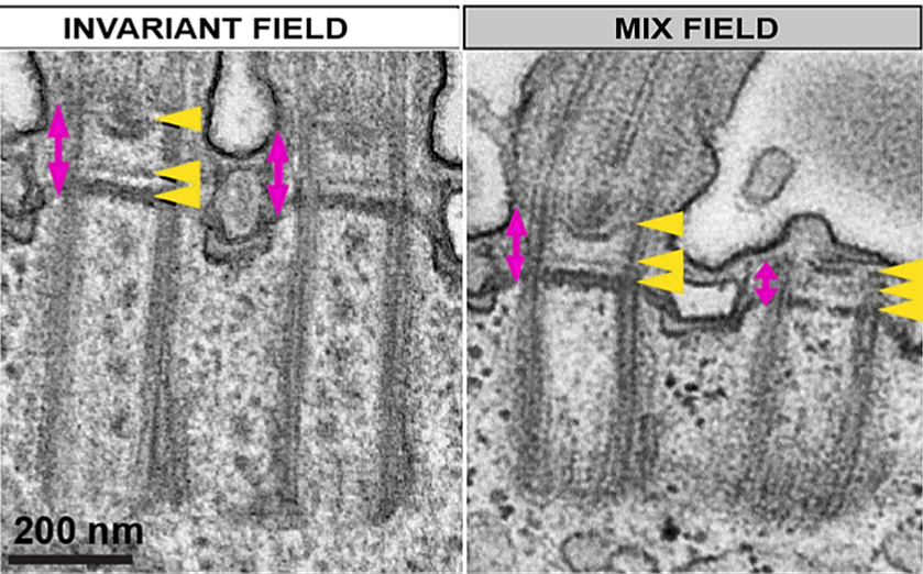 Fig. 1. Localización de proteínas TZ en Paramecium. (B) Imágenes de Microscopía electrónica que muestran una sección longitudinal de unidades de dos BB en el campo invariante (izquierda) y el campo mixto (derecha). La TZ (flecha magenta) se caracteriza por la presencia de 3 capas sucesivas indicadas por puntas de flecha amarillas. De abajo hacia arriba: la placa terminal, la placa intermedia y la placa axosómica. Tenga en cuenta que el BB no conciliado en el campo mixto muestra una TZ reducida en comparación con los ciliados. Barra de escala= 200 nm.